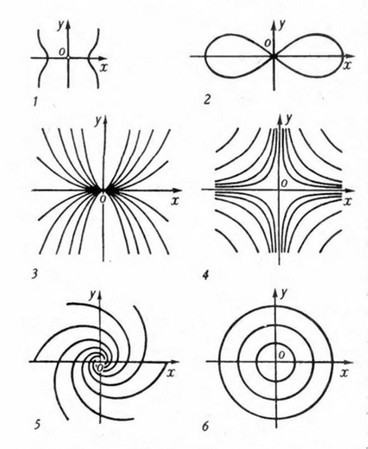 Դիֆերենցիալ հավասարումների եզակի կետ․ հանգույց (նկ․ 3), թամբ (նկ․ 4), կիզակետ (նկ․ 5), կենտրոն (նկ․ 6)